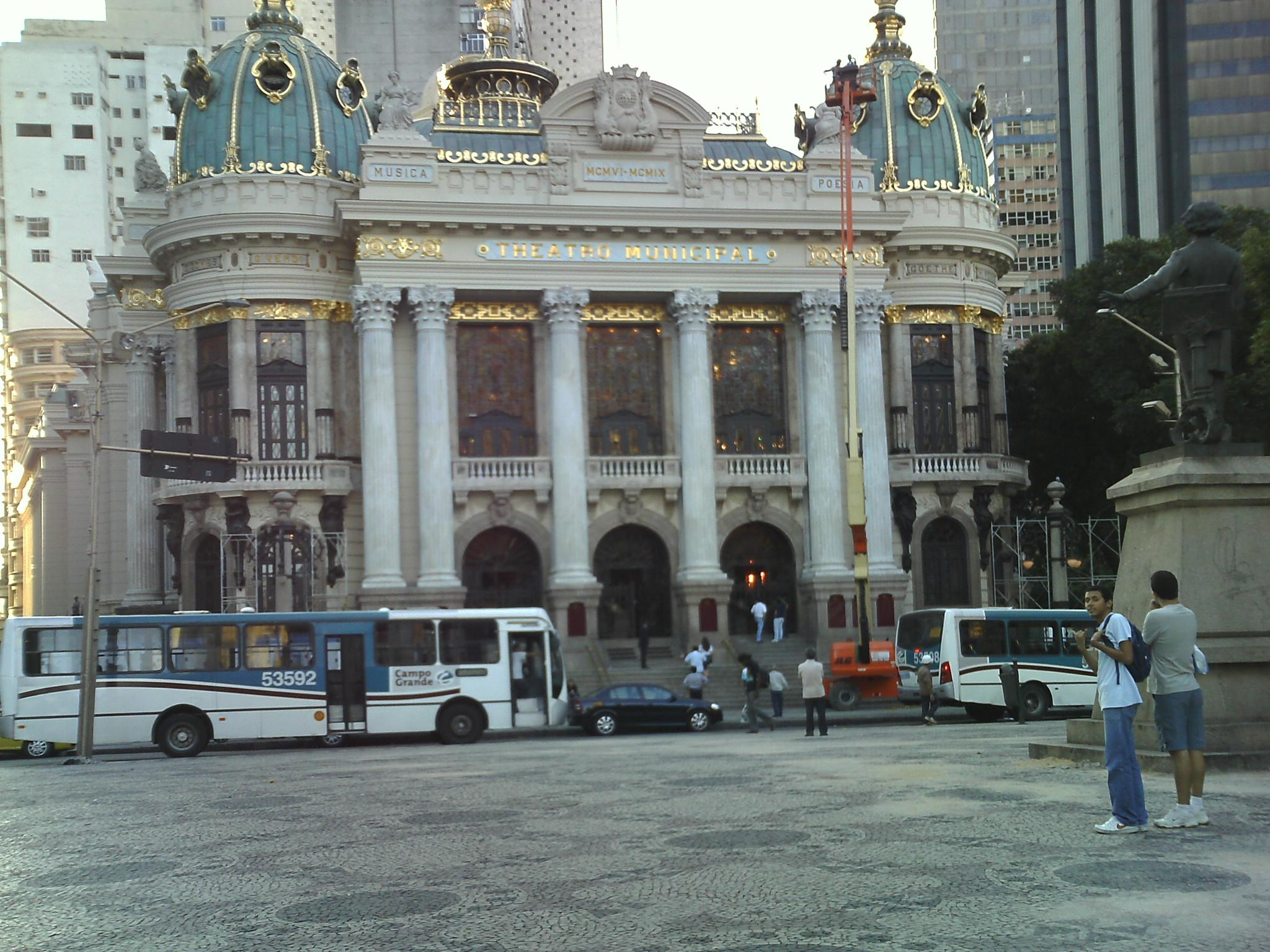 Theatro Municipal, em 22-05-2010.